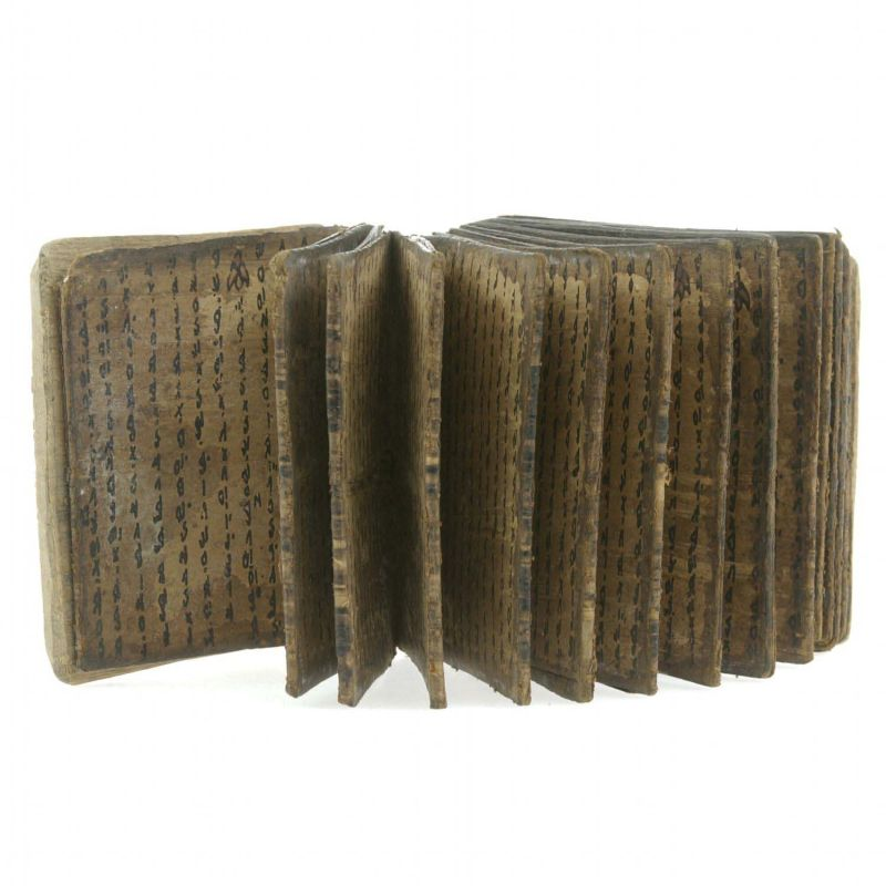 Wichelboek. Wichelboek met formules, recepten en voorschriften die worden toegepast door de priester-genezer (datu, guru). De teksten in het wichelboek handelen over de kunst van het onderhouden van het leven (o.a. recepten van medicijnen), de kunst van het vernietigen van het leven en de kunst van waarzeggerij. Het wichelboek is door de datu zelf samengesteld en geschreven. Als religieuze specalist van de Batak, maakte zijn kennis van de goden en geesten, van zwarte en witte magie, van ziekten en geneeswijzen en van de gunstige en ongunstige dagen hem tot een centrale en invloedrijke figuur in de traditionele gemeenschap. Naast het dorpshoofd was hij de belangrijkste persoon van het dorp, die geraadpleegd werd bij vragen of problemen, die bemiddelde tussen voorouders en mensen en die optrad in geval van ziekte. Hij was ook de ceremoniemeester bij plechtigheden. Daarnaast bezat de priester-genezer een kracht om aan een vijandelijk dorp schade toe te brengen (Sibeth 1991:103, 126).. Wichelboek met formules, recepten en voorschriften die worden toegepast door de priester-genezer Unknown language: Pustaha